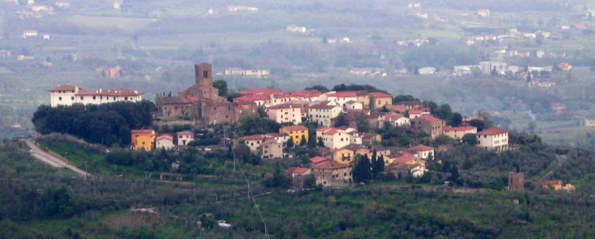 Castello di monsummano alto, vista, montevettolini